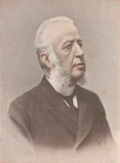 Tomás Luceño; fotografía de Franzen